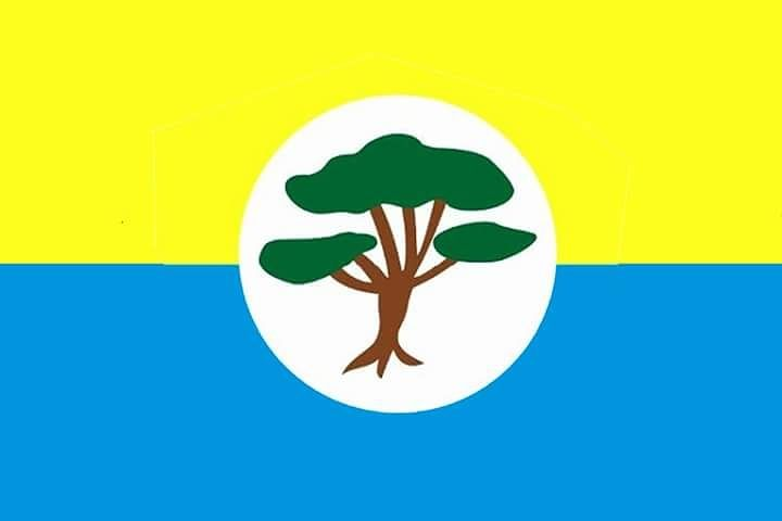 Recriação da Bandeira de Mata Roma-MA pelo fotógrafo Flávio Reis para postar e está disponível na internet.